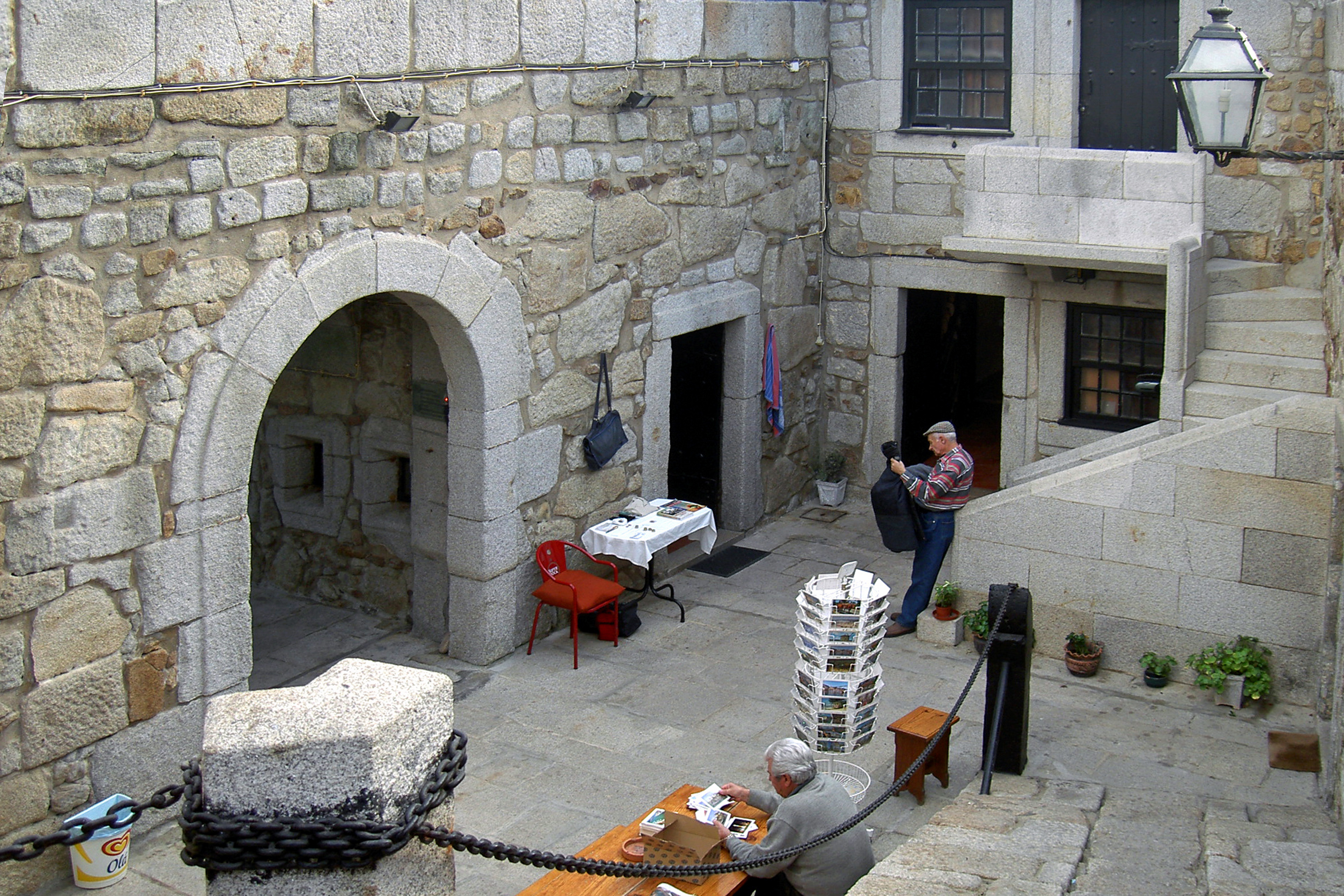 Castelo do Queijo ou Fortaleza do Queijo This file was uploaded for Wiki Loves Monuments in Portugal with the unique identifier 74496.